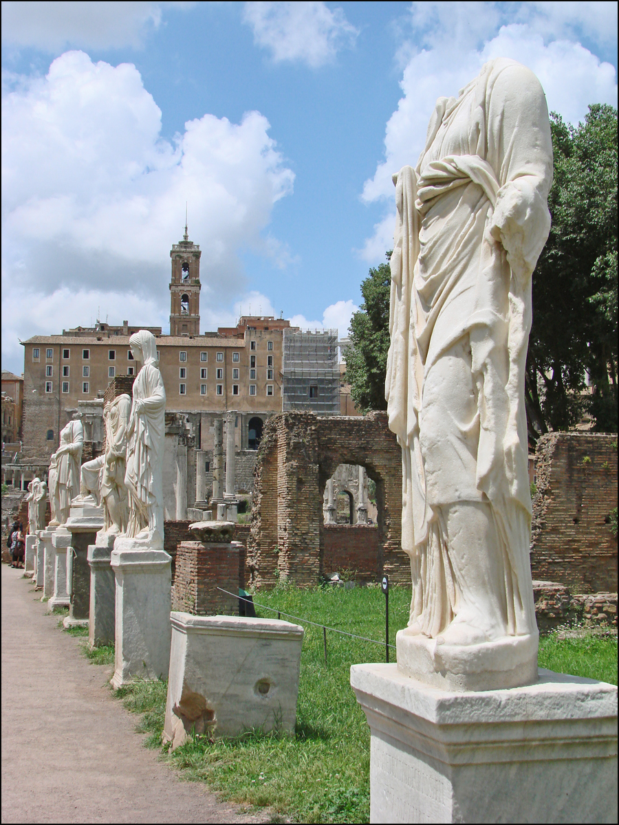 Statues de Vestales dans la cour de la maison des Vestales (Atrium Vestae) Au fond, le Capitole. Près du temple de Vesta, se trouvait une maison qui abritait la communauté des Vestales, les prêtresses du culte de Vesta, la déesse protectrice du feu. La maison a deux étages comportait une cour rectangulaire agrémentée de jardins, de bassins et entourée d'un portique. A partir du IIIème siècle, des statues de Vestales ont été érigées.